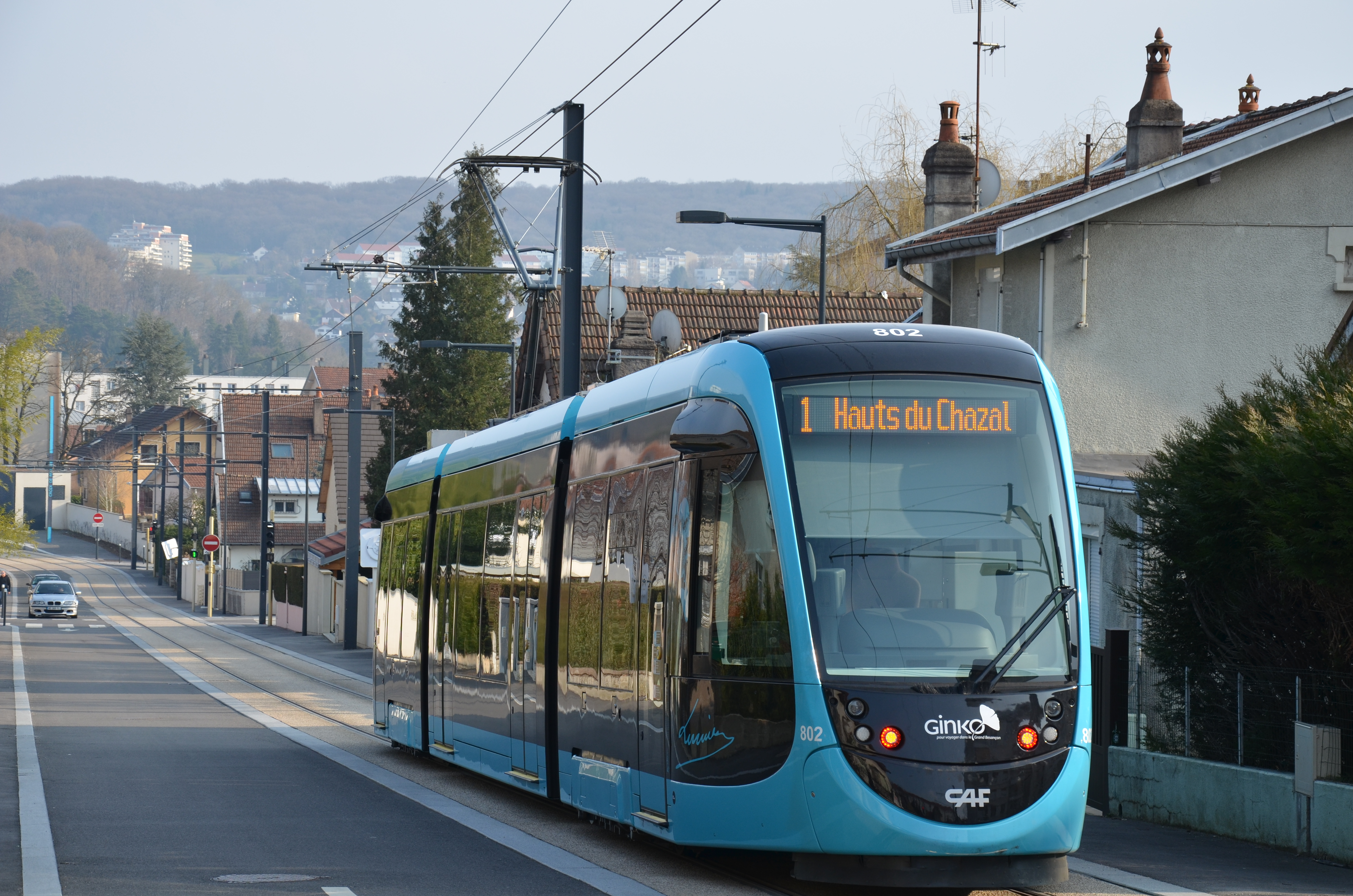 CAF Urbos 3 n°802 de la ligne 1 du réseau GINKO, sur la voie unique près de la station Croix de Palente.